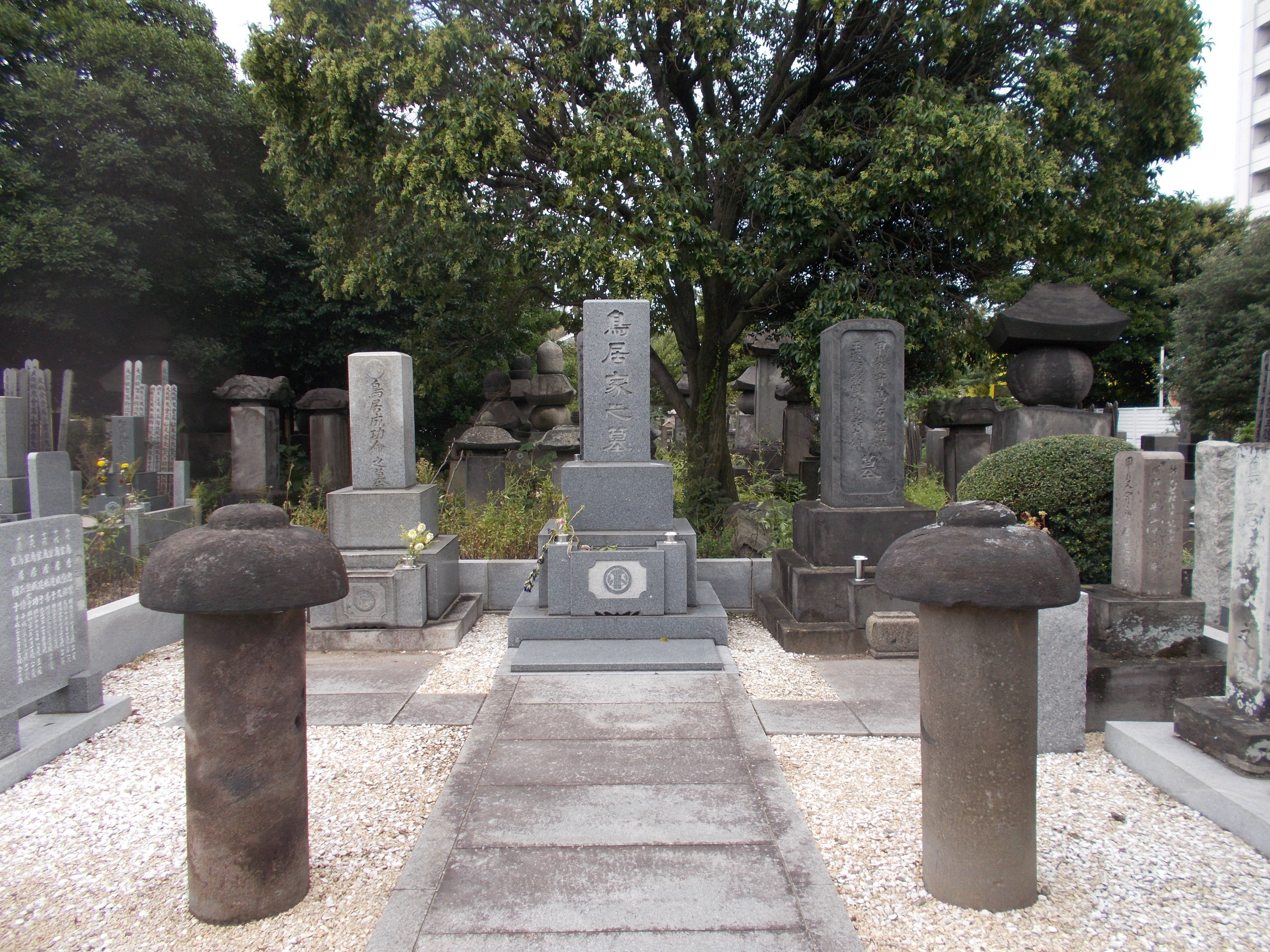 鳥居耀蔵の墓